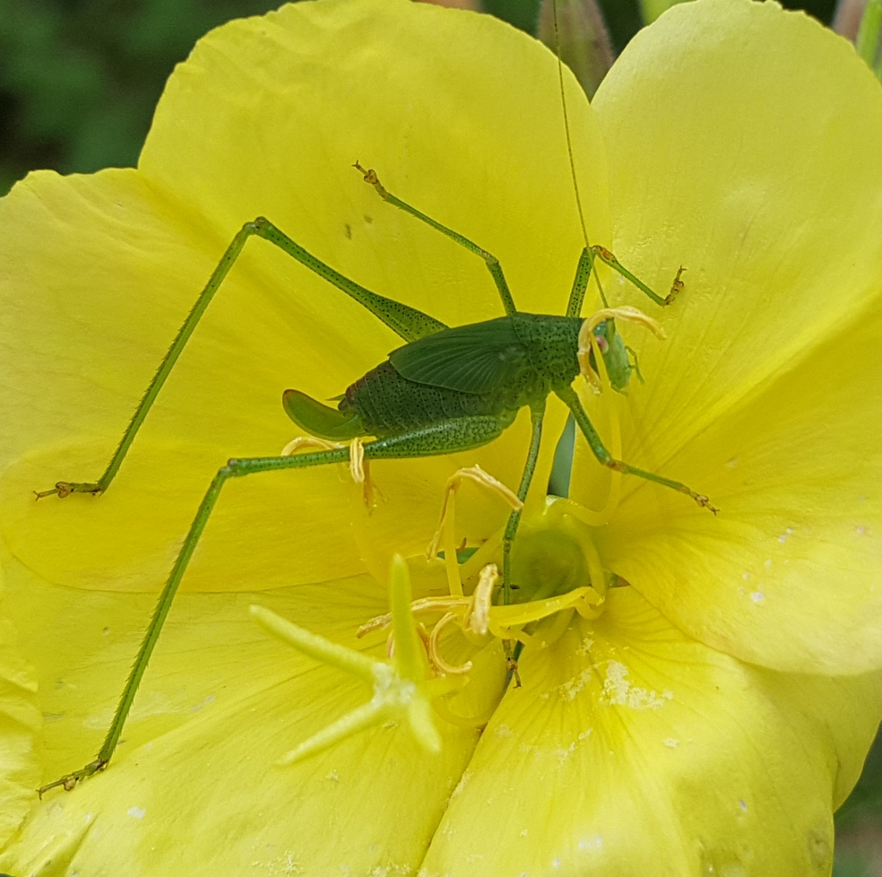 matxinsaltoa. Uliako mintegiak